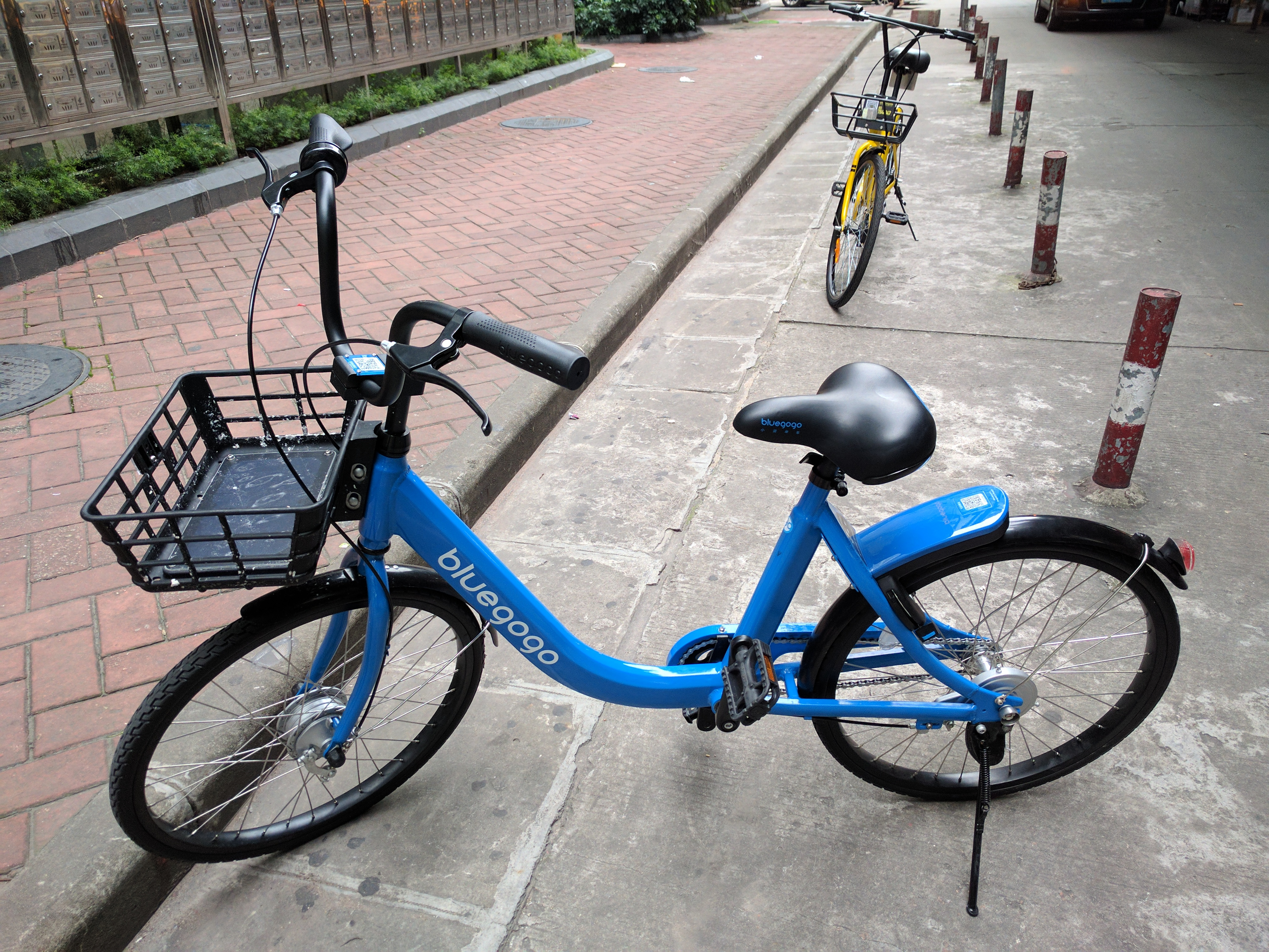 小蓝单车，车篮有加固改良